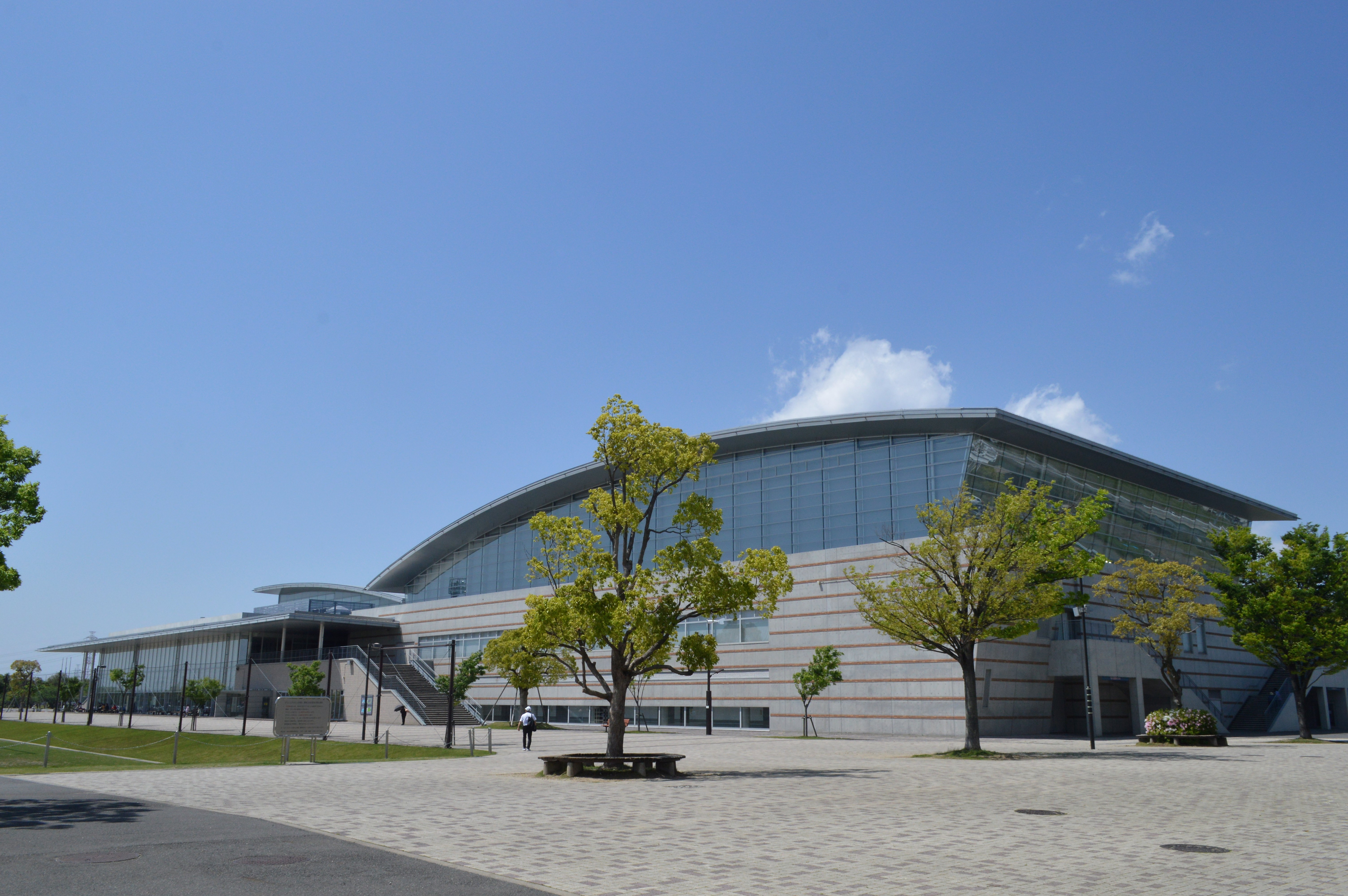 愛知県刈谷市の刈谷市総合運動公園にあるウイングアリーナ刈谷。